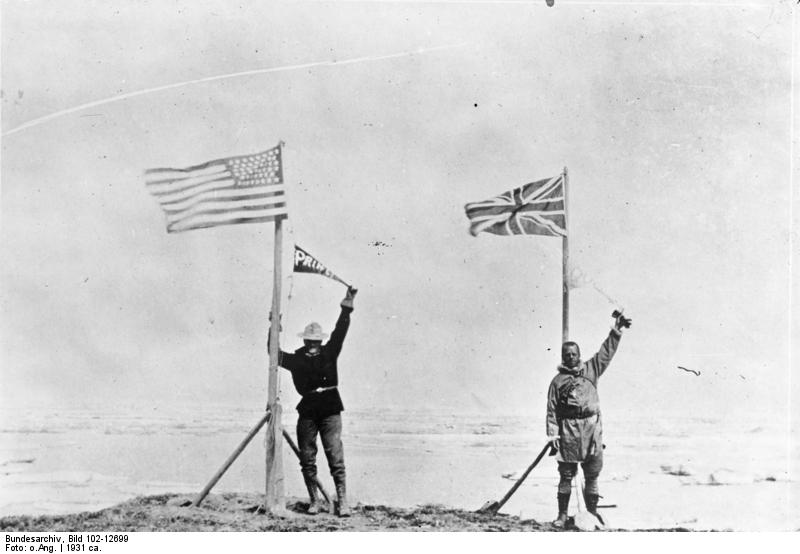 Die nördlichste Grenzwache der Welt! Hoch im Norden von Alaska, wo der Meridian-Fluss in das Nördliche Eismeer mündet, befinden sich die Grenzpfähle der amerikanischen und englischen Nation.